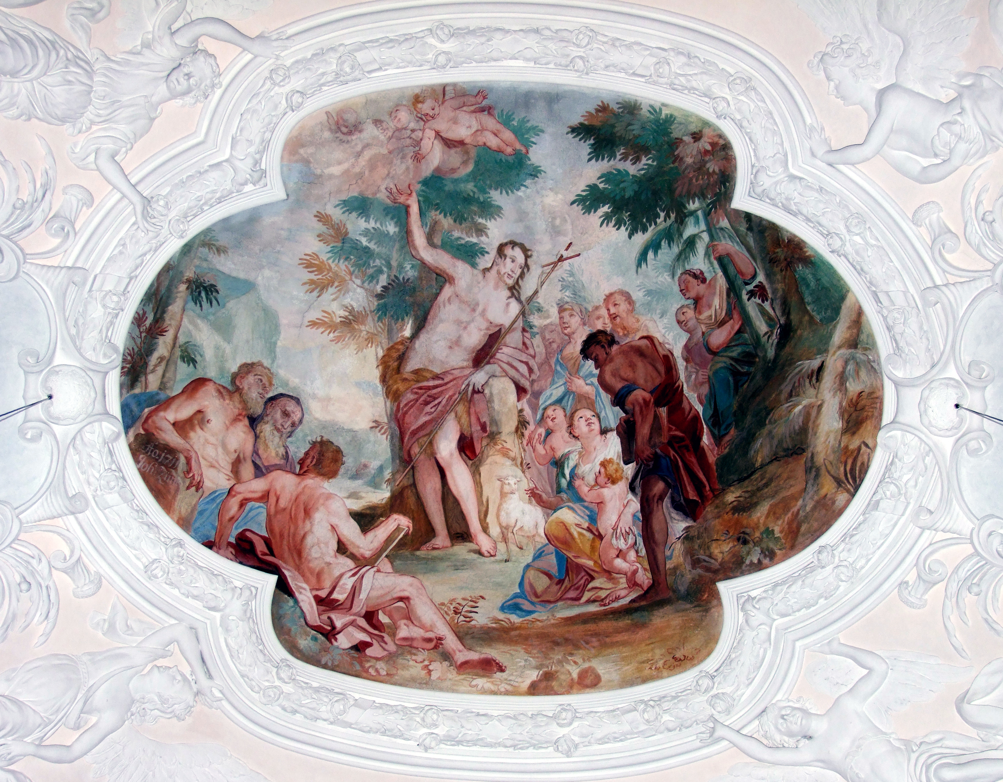 Fresko in der ehemaligen Klosterkirche der Kartause in Buxheim bei Memmingen - OpenStreetMap (Info)